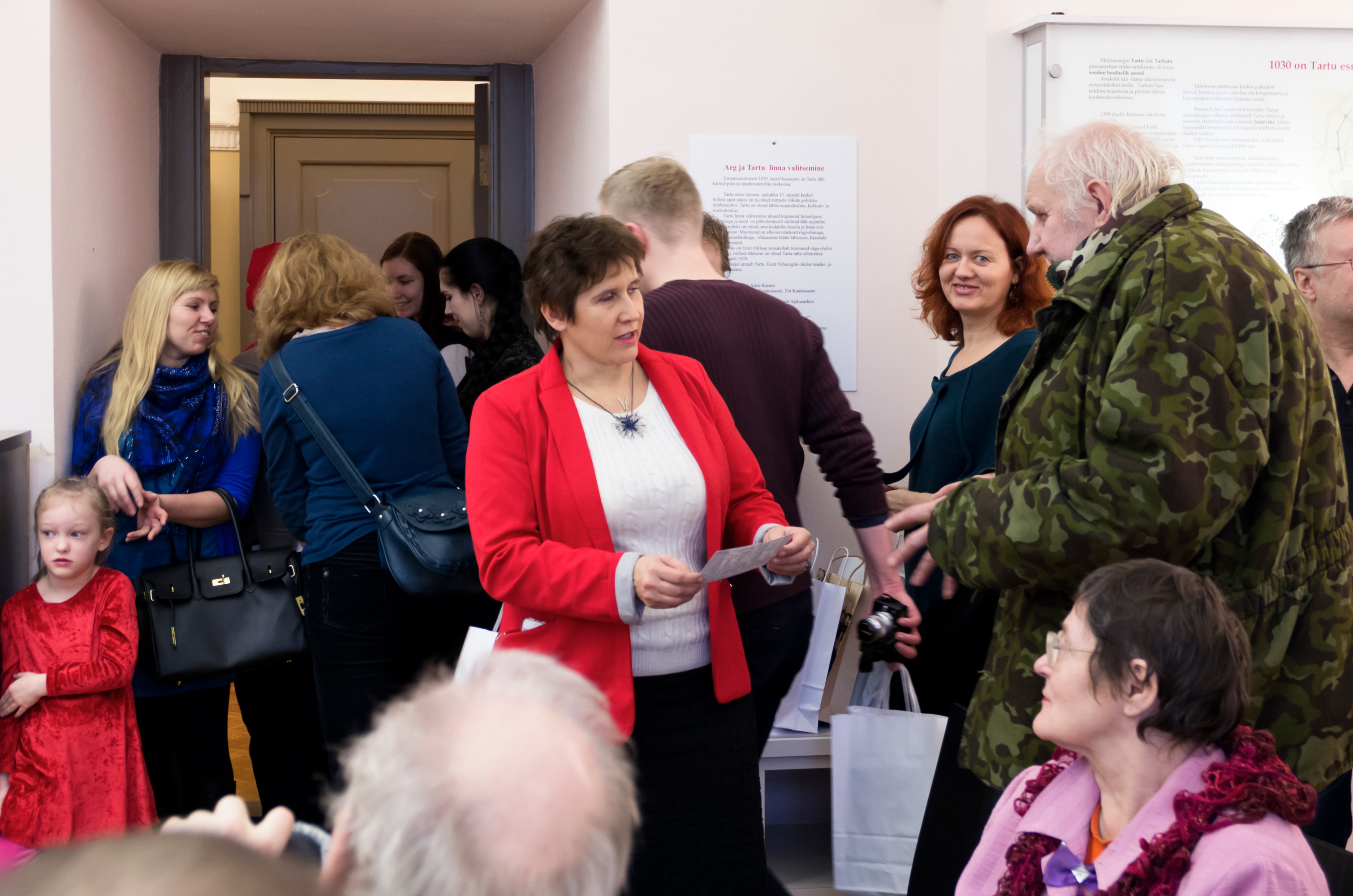 Tartupeedia fotovõistluse näituse avamine 11. Jaanuaril 2014 Tartu raekojas. Jaan Muna annab üle läkituse linnapeale.